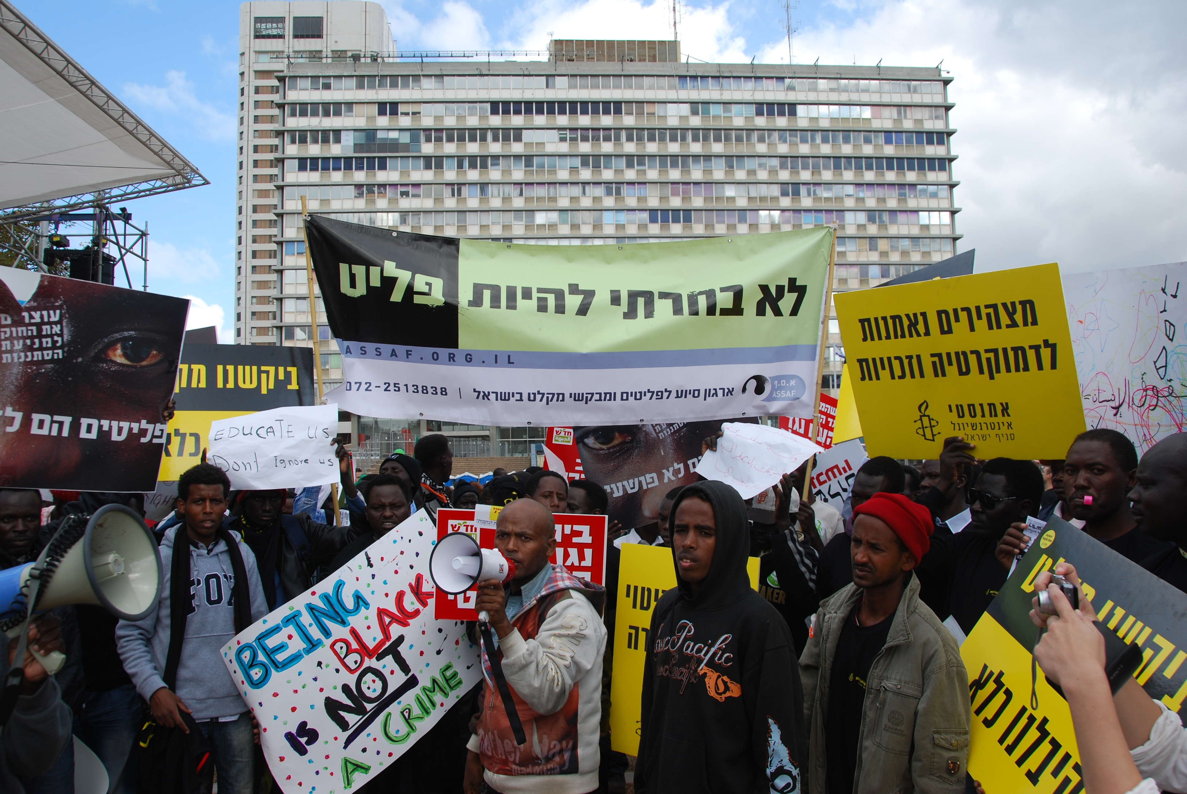 מצעד זכויות האדם 2011